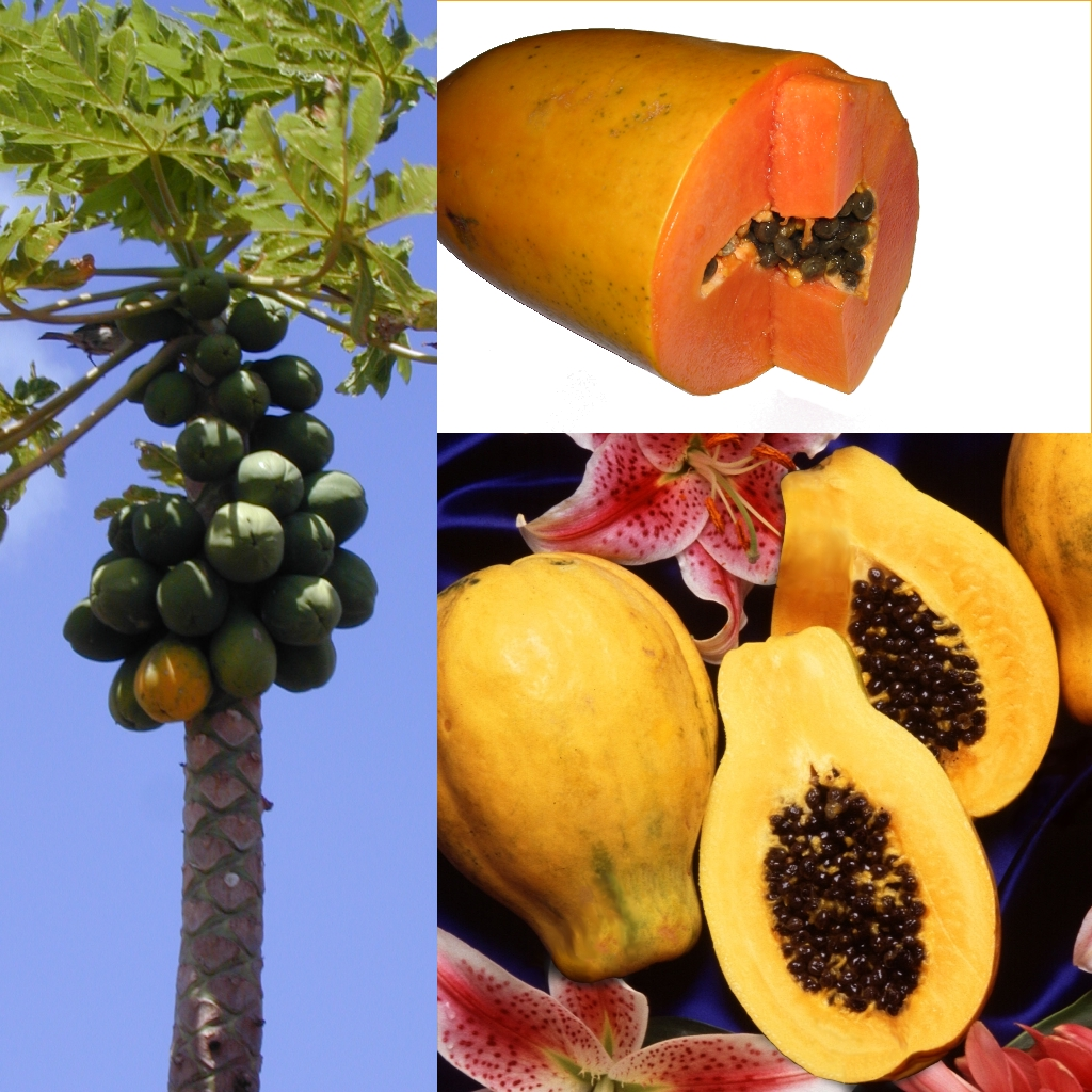 Grafika podręcznika Wikijunior:Owoce. Papaja; drzewo melonowe, melonowiec właściwy (Carica papaya).